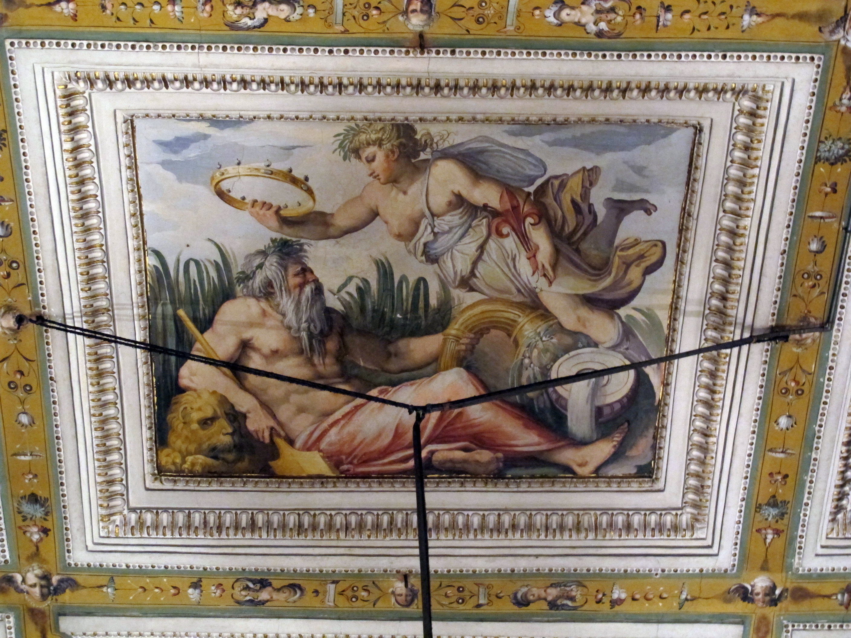 Palazzo di sforza almeni, sala con affreschi, centro con fiume arno